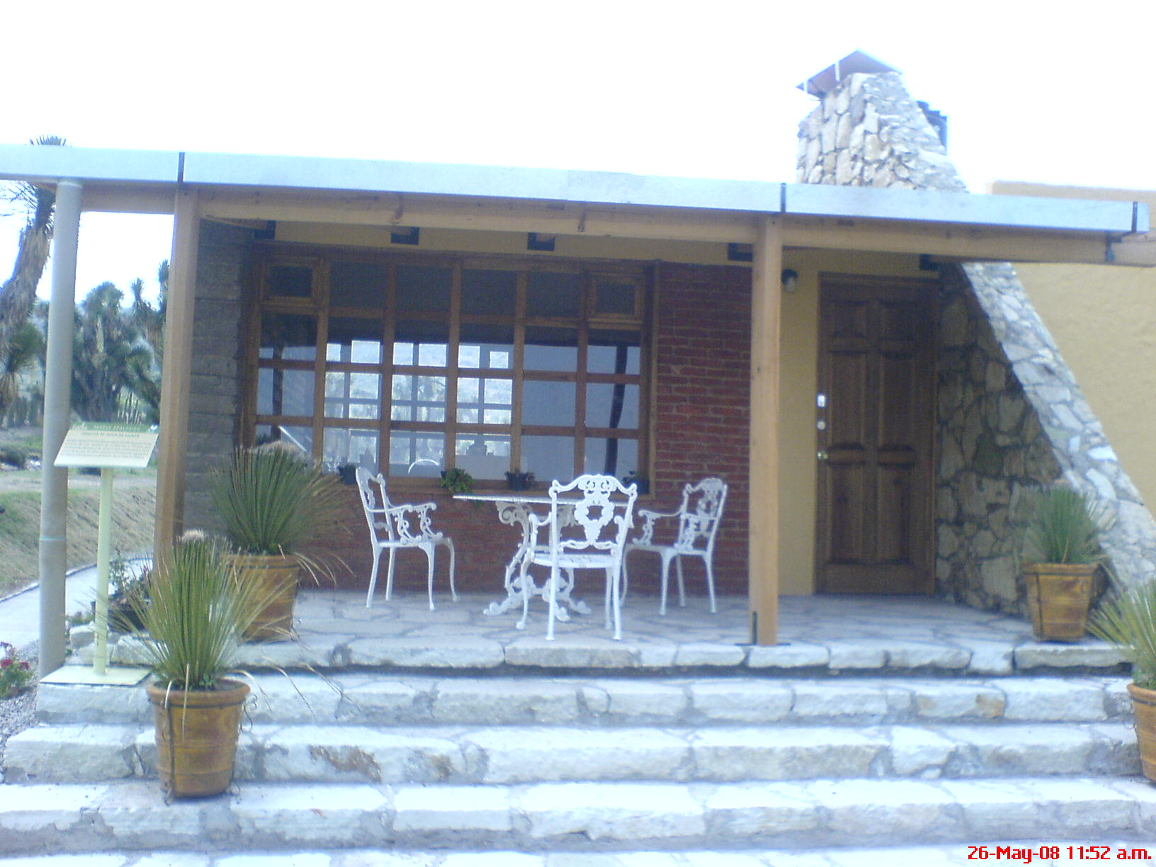 casa ecologica en el parque ecologico cubitos